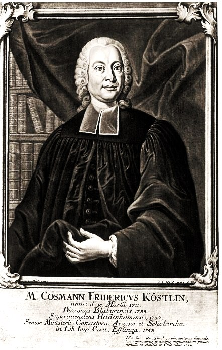 Porträtgraphik Cosmann Friedrich Köstlin